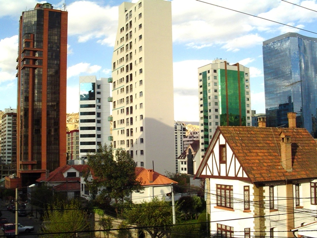 San Jorge - La Paz - Bolivia